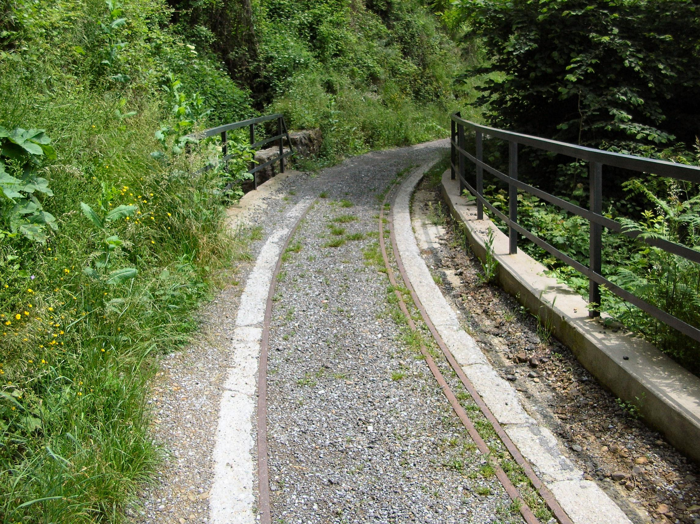 Foto propria Giugno 2008 Percorso della dismessa Autoguidovia della Guardia (Ceranesi, Genova)